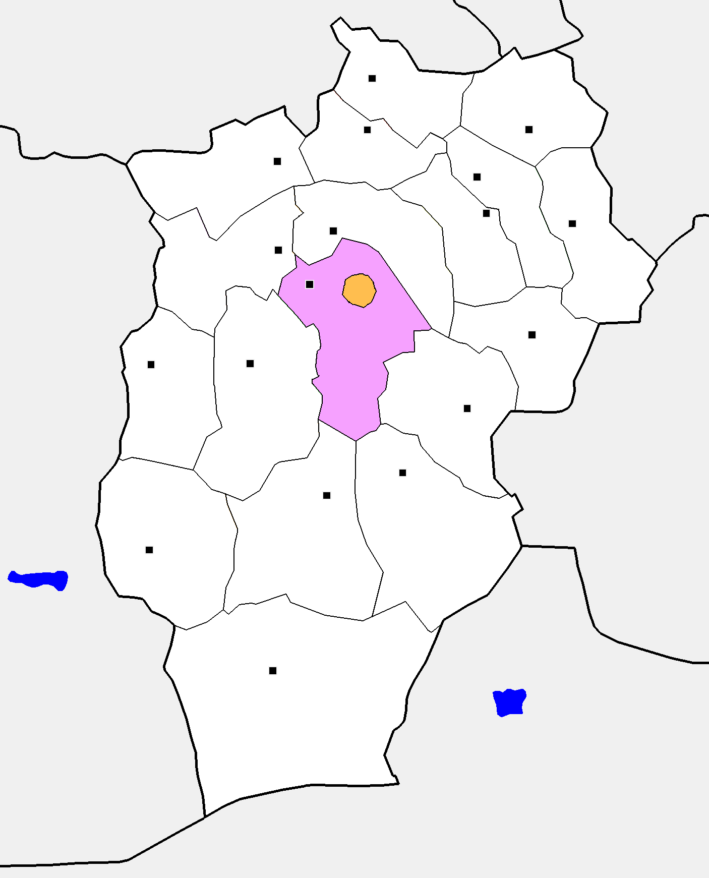 Монгол: Өвөрхангай аймгийн Тарагт сумын байршил